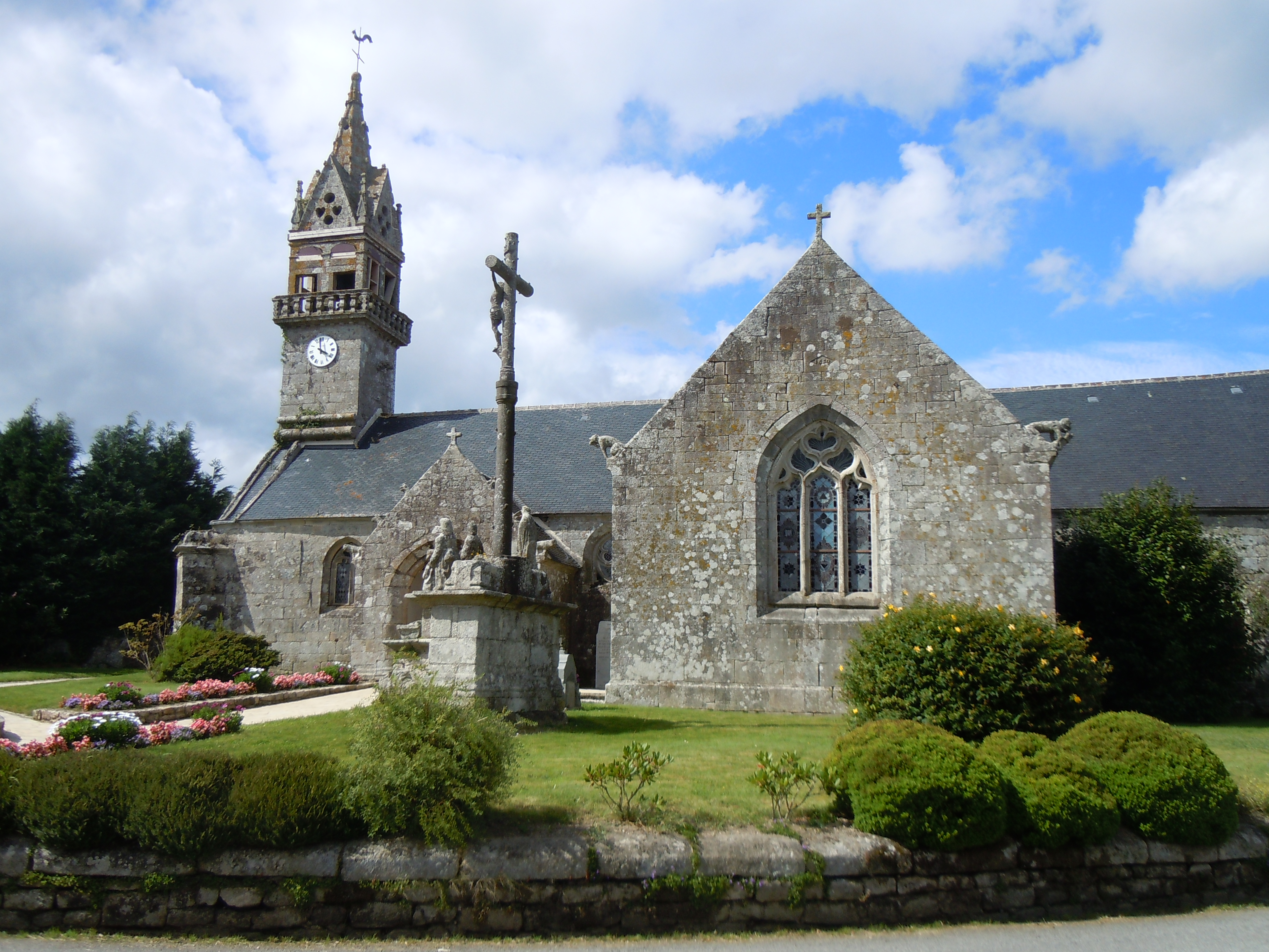 façade méridionale de l'église Saint-Corentin de Trégornan-en-Glomel et calvaire This building is indexed in the Base Mérimée, a database of architectural heritage maintained by the French Ministry of Culture, under the references IA00004116 and IA00004101.